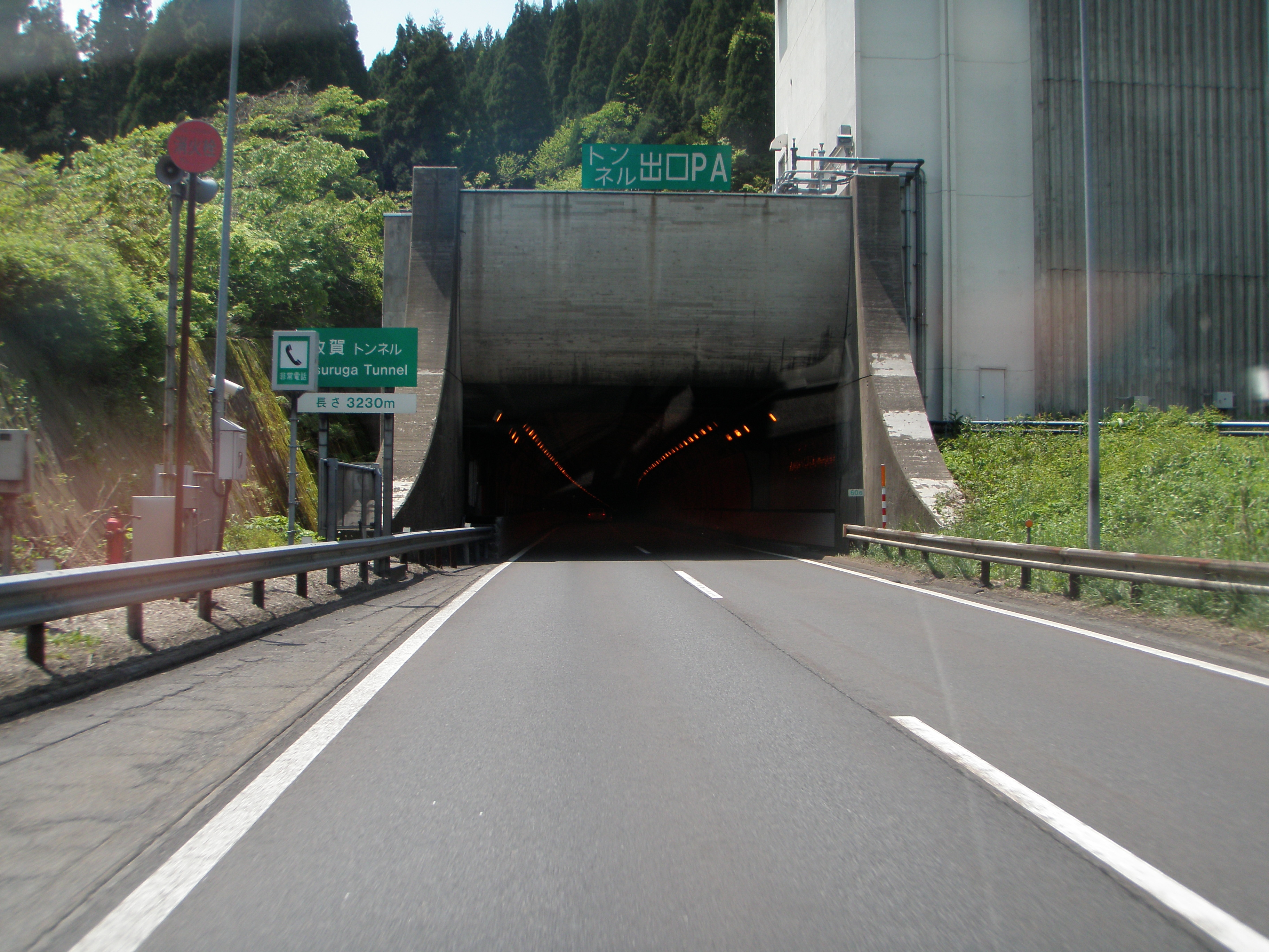 敦賀トンネル上り線の入り口